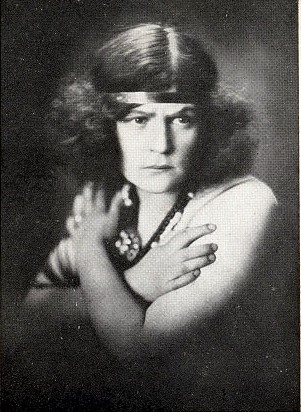 Giusseppe Verdi: Aida. Operaház. Németh Mária (1897 – 1967) magyar szopránénekes Aida szerepében.